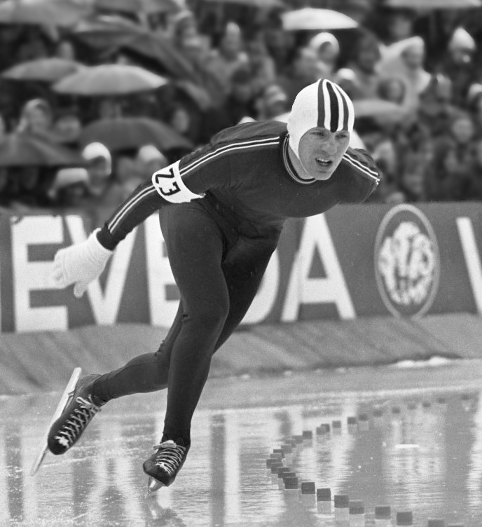 Wereldkampioenschappen schaatsen voor amateurs in Deventer Sten Stensen in aktie